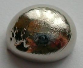 La bildo estas kopiita de de. La originala priskribo estas: * Bildbeschreibung: Palladium, 2,7g, 99,99% rein * Quelle: Foto aus meiner Elementesammlung * Fotograf: Tomihahndorf * Datum: März 2006